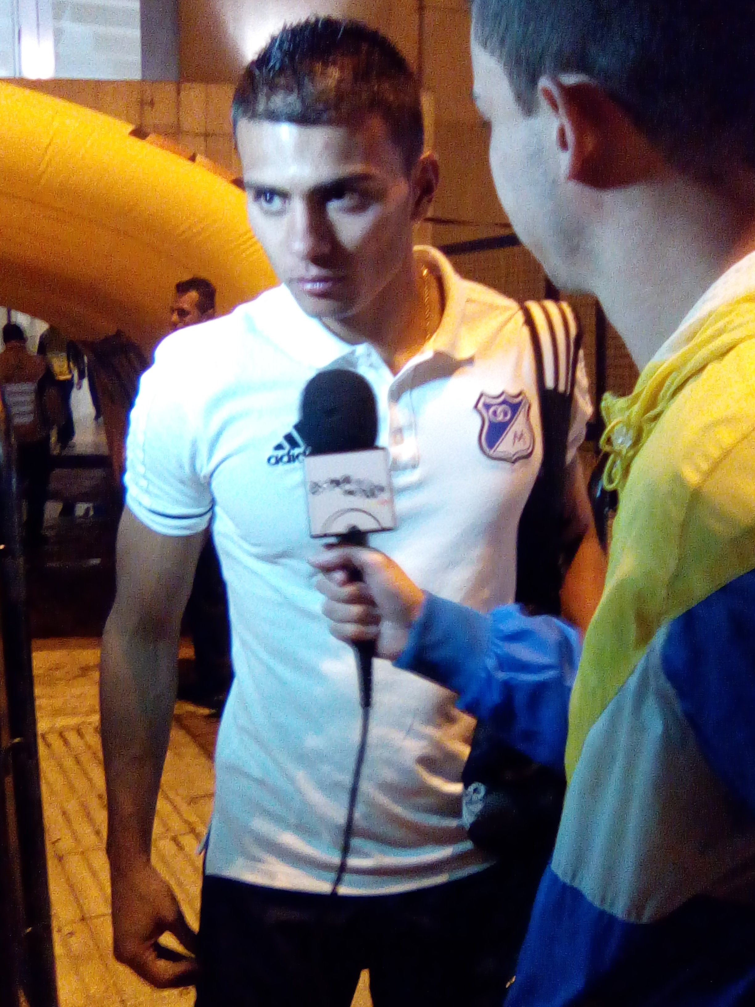 Jhon Duque al salir de un partido de Millonarios.